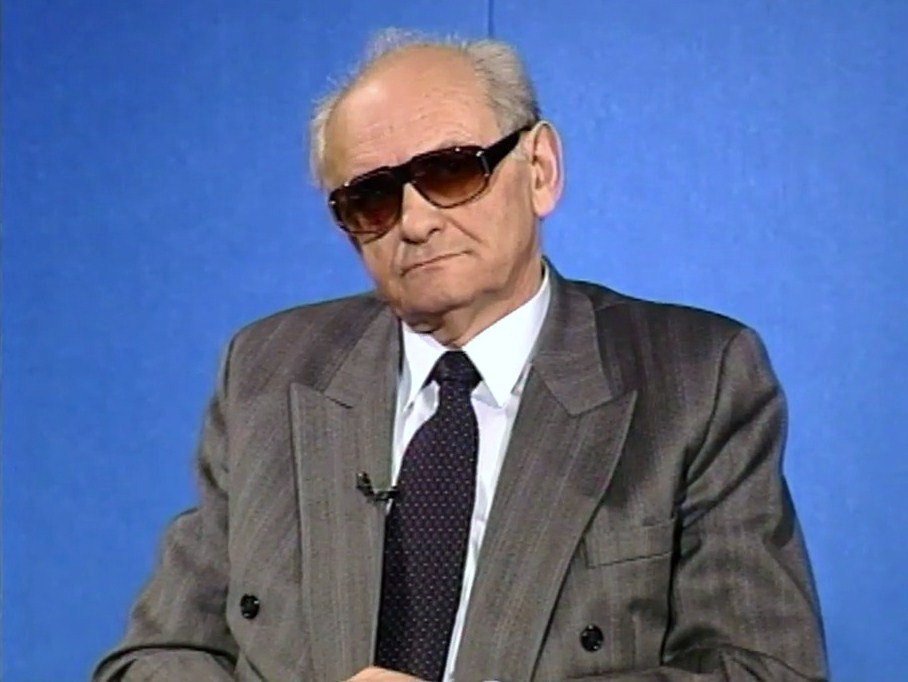 Andrzej Szczypiorski, literat i polityk.